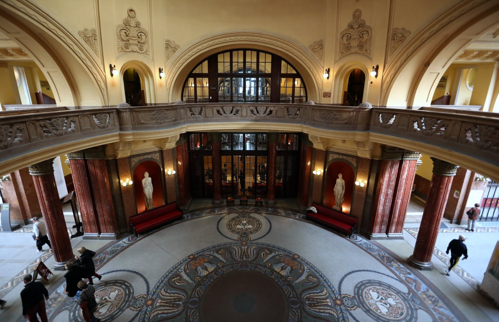 Gellért Fürdő, Budapest